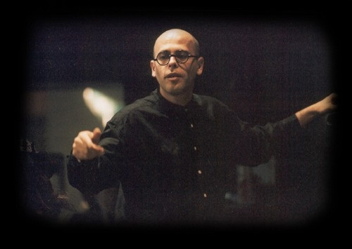 אבי בנימין